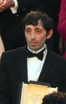 Cérémonie de clôture du festival de Cannes